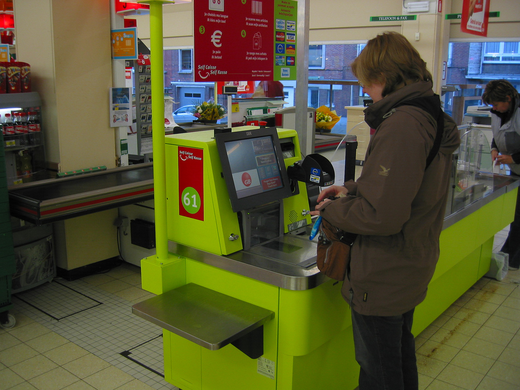 fast, simple, sensible